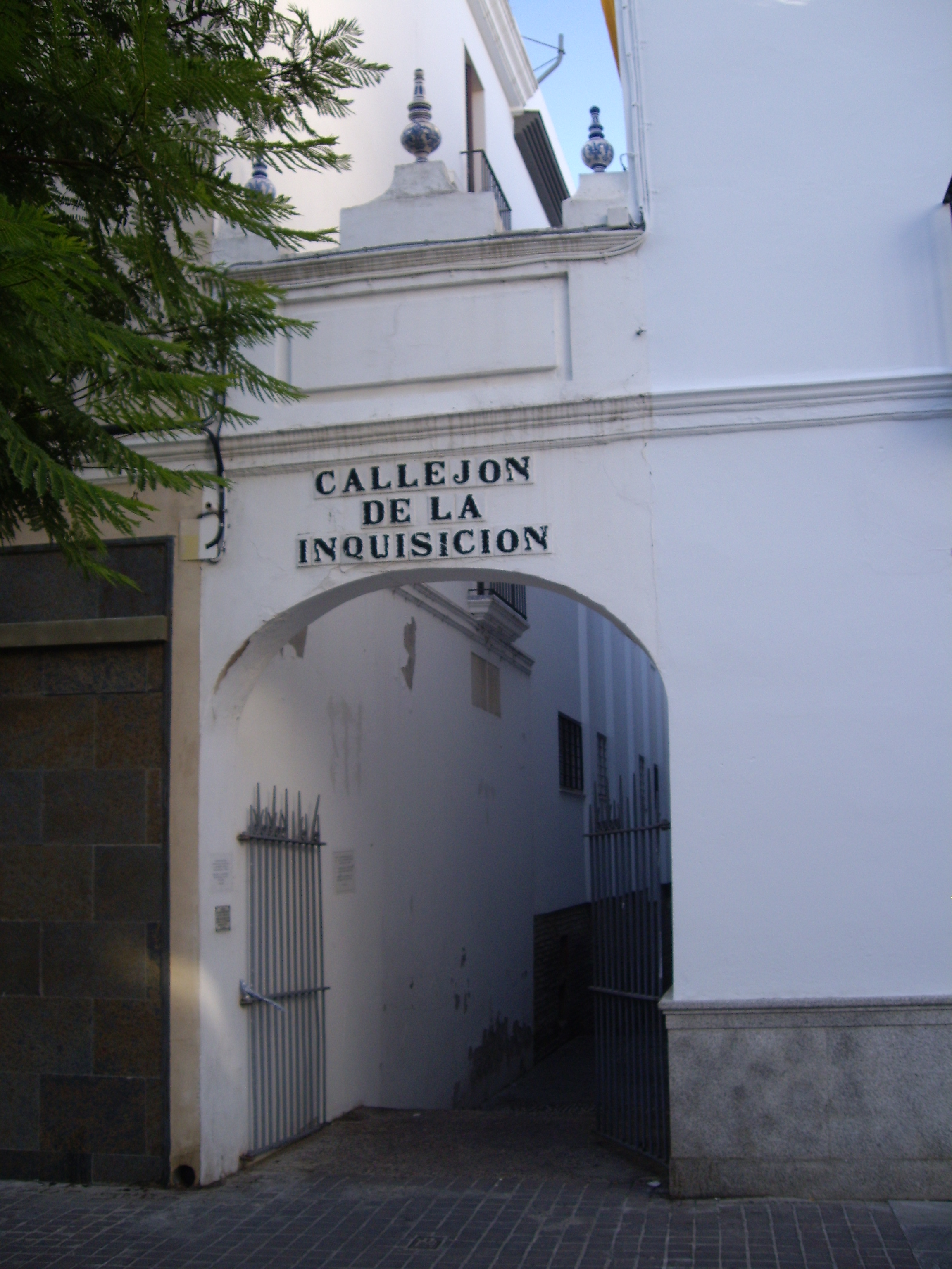 Callejón situado junto a donde se encontraba el Castillo de San Jorge de Sevilla. Comunica la Calle Castilla con el Paseo de la O. Se dice que por ahí pasaban los condenados por la Inquisición, que tenía su sede en ese Castillo.